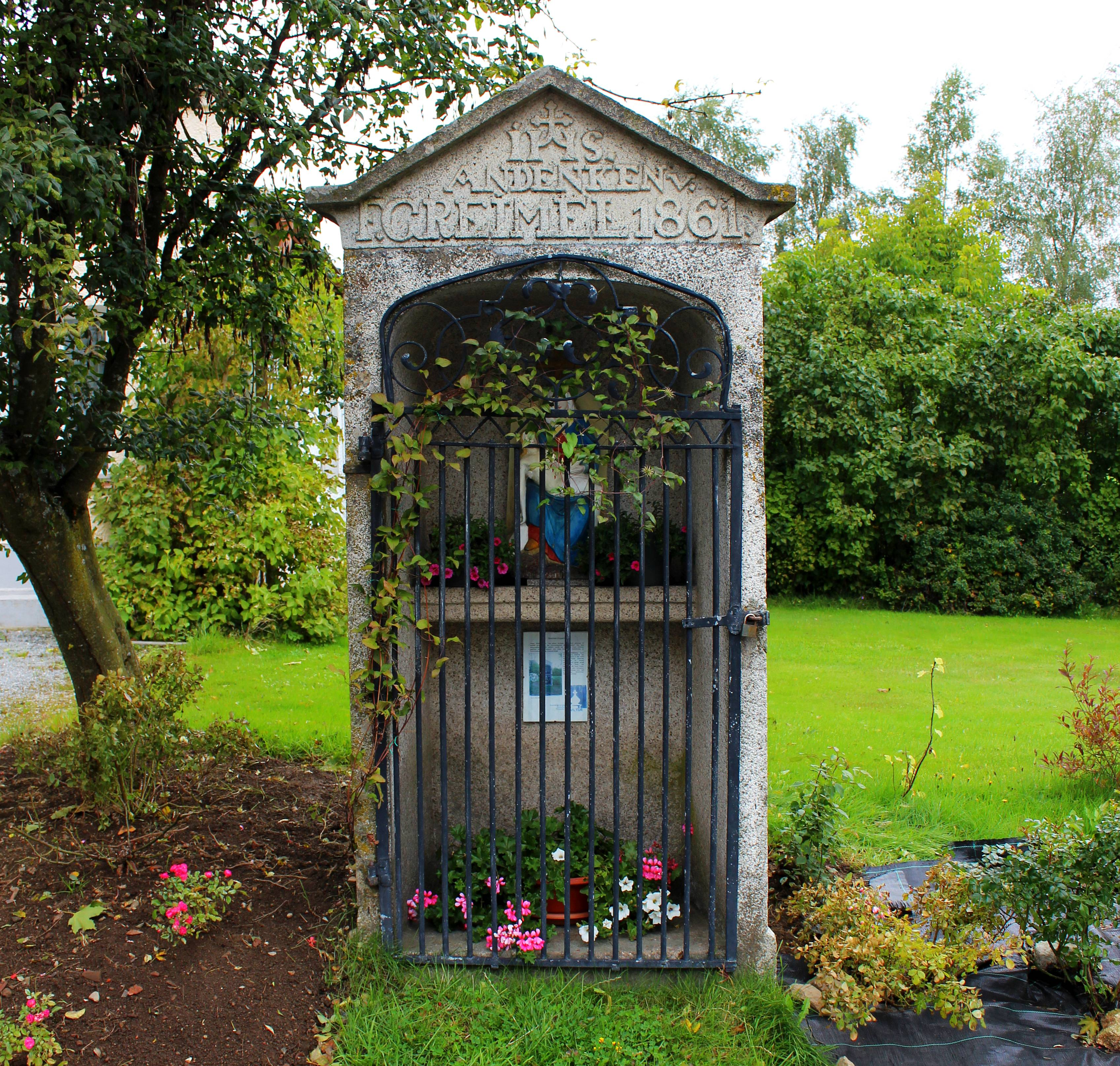 Wirtskapelle am Gasthof Zur Alten Post Herzogsreut)